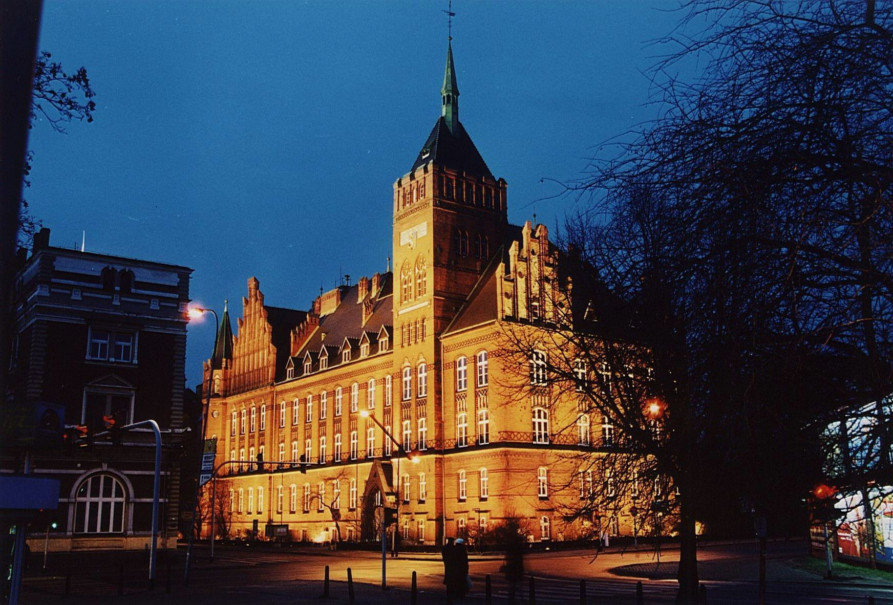 Budynek obecnego Wydziału Technologii i Inżynierii Chemicznej Politechniki Śląskiej; Gliwice, ul. Strzody 9